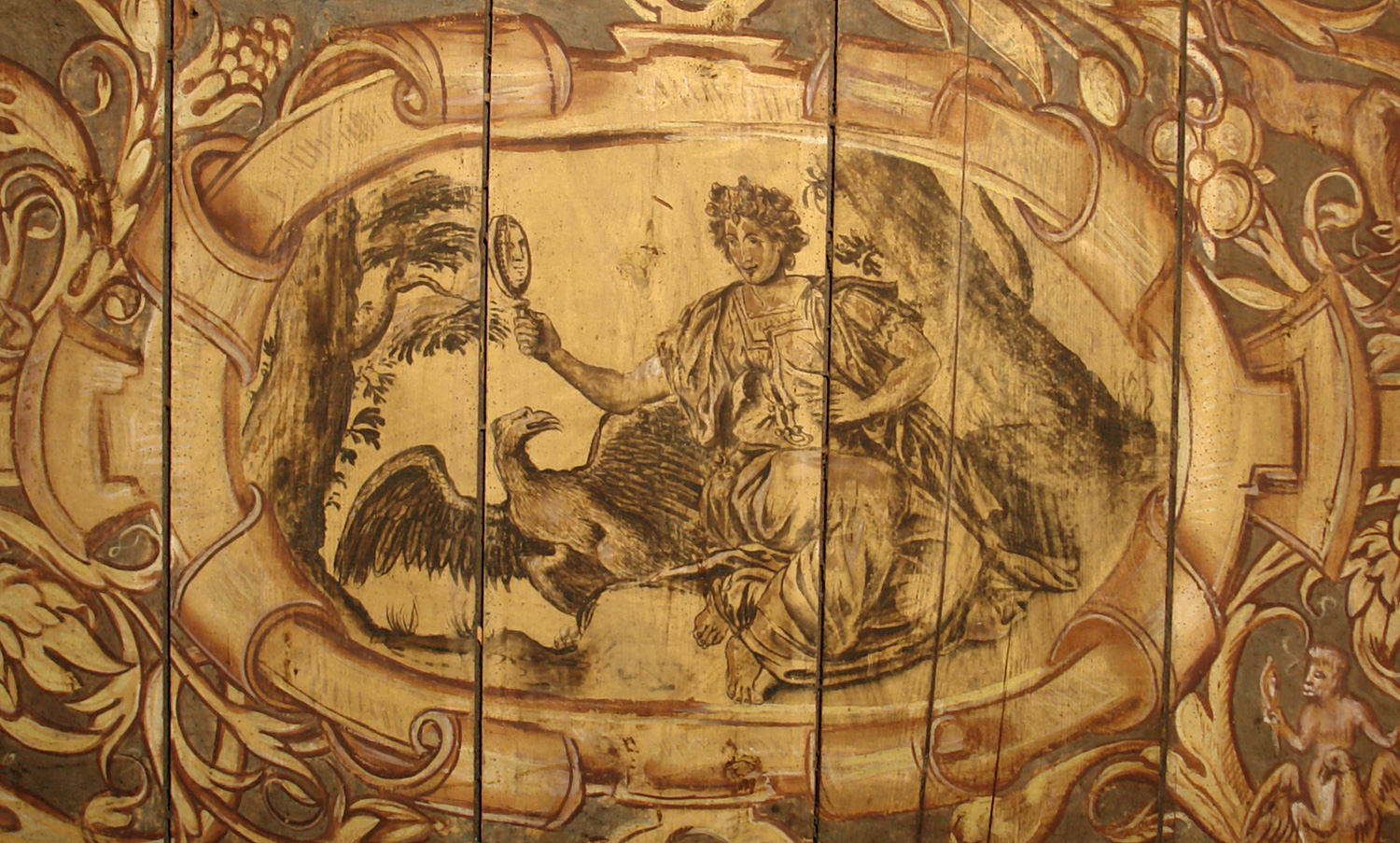 Bremen: Haus Heineken in der Sandstraße 3. Deckenmalerei von 1580, Medaillon „Visus“ mit den Attributen Spiegel und Adler